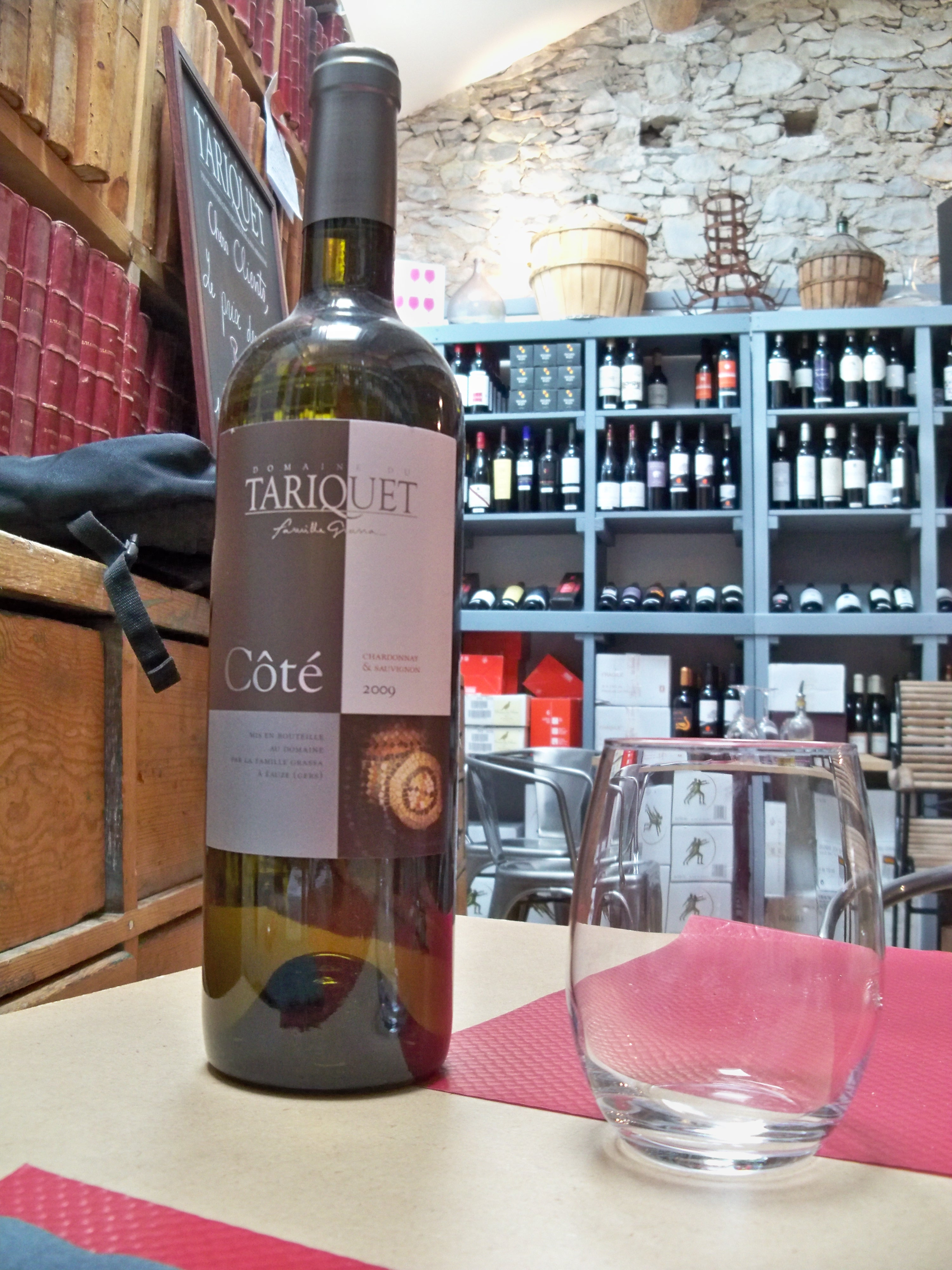 Vin Cotes de Gascogne